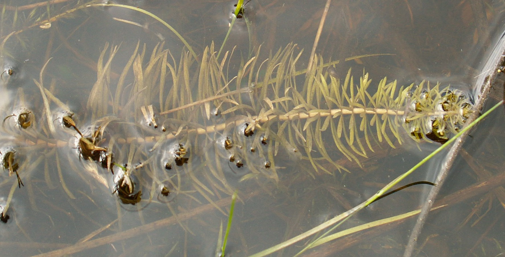 Hippuris vulgaris on Miedwie Lake NW Poland, submerged plant